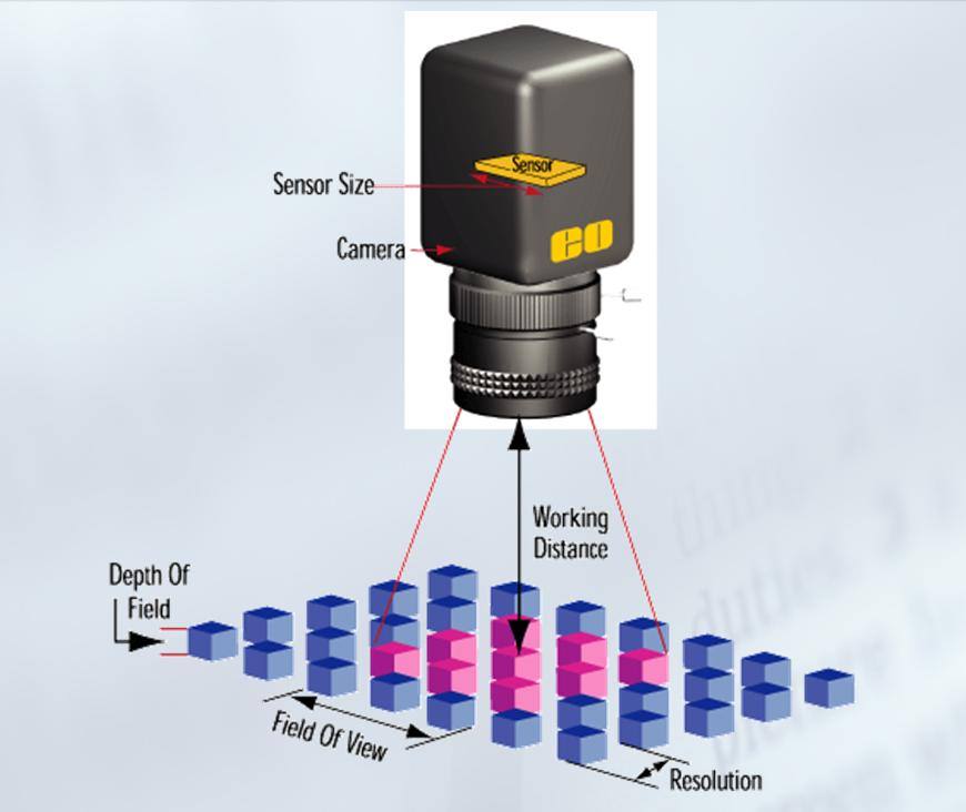 AOI system